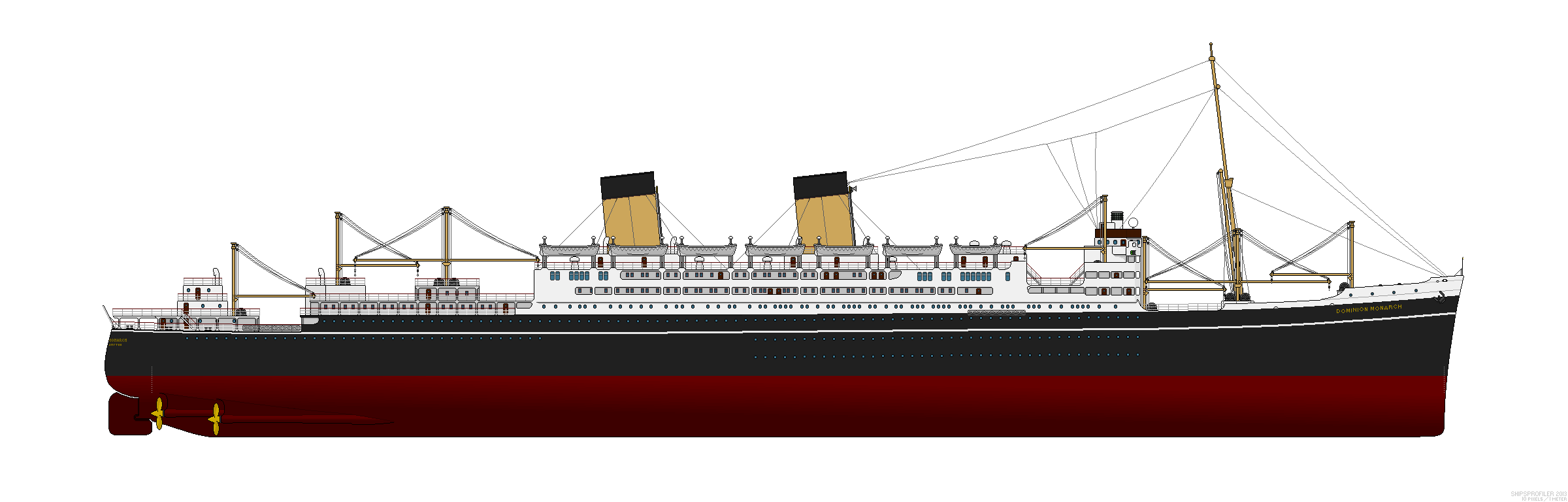 QSMV Dominion Monarch 1948 Shaw, Savill and Albion Line